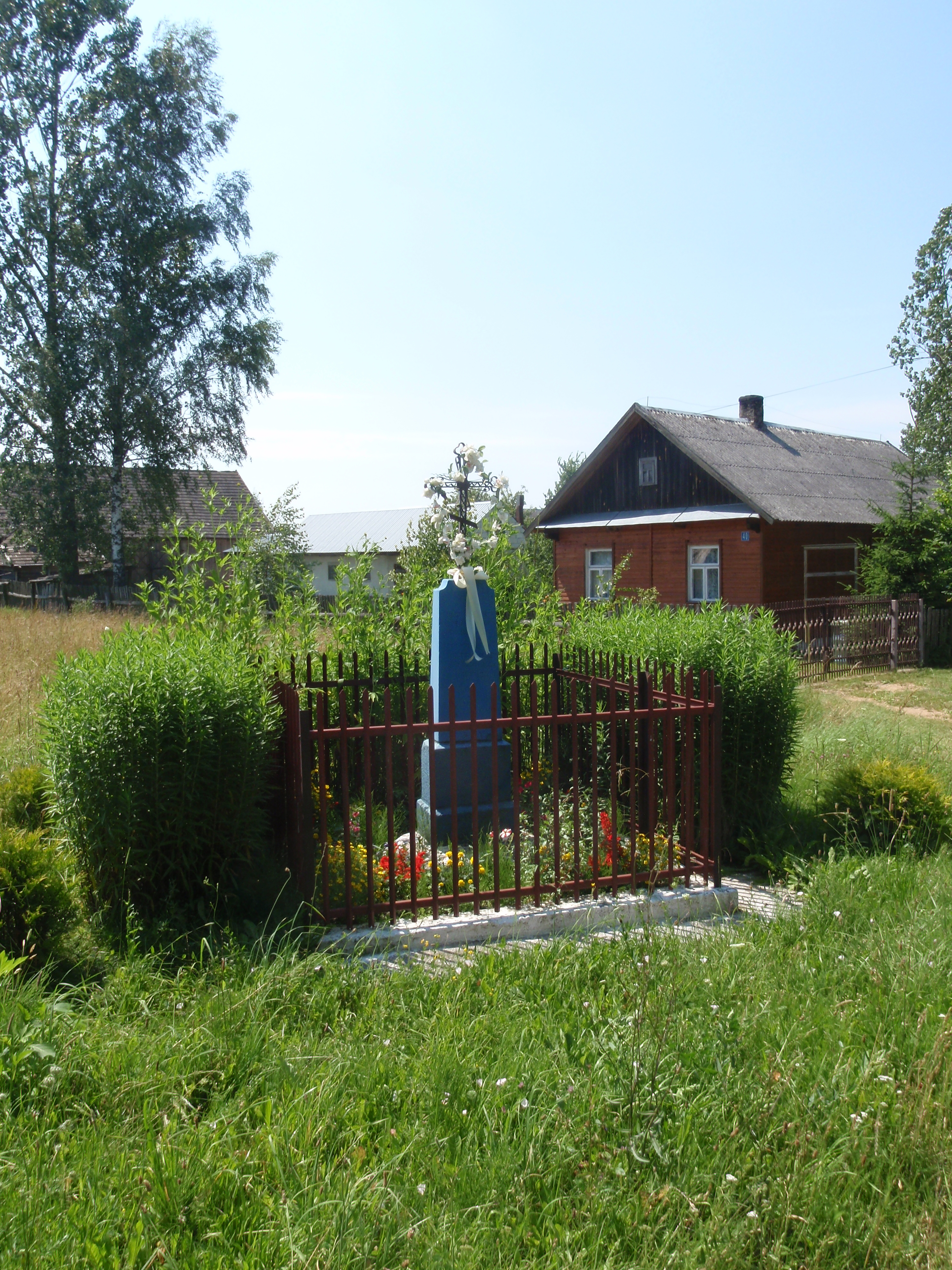 kapliczka przydrożna we wsi Kutowa, od strony Łosinki